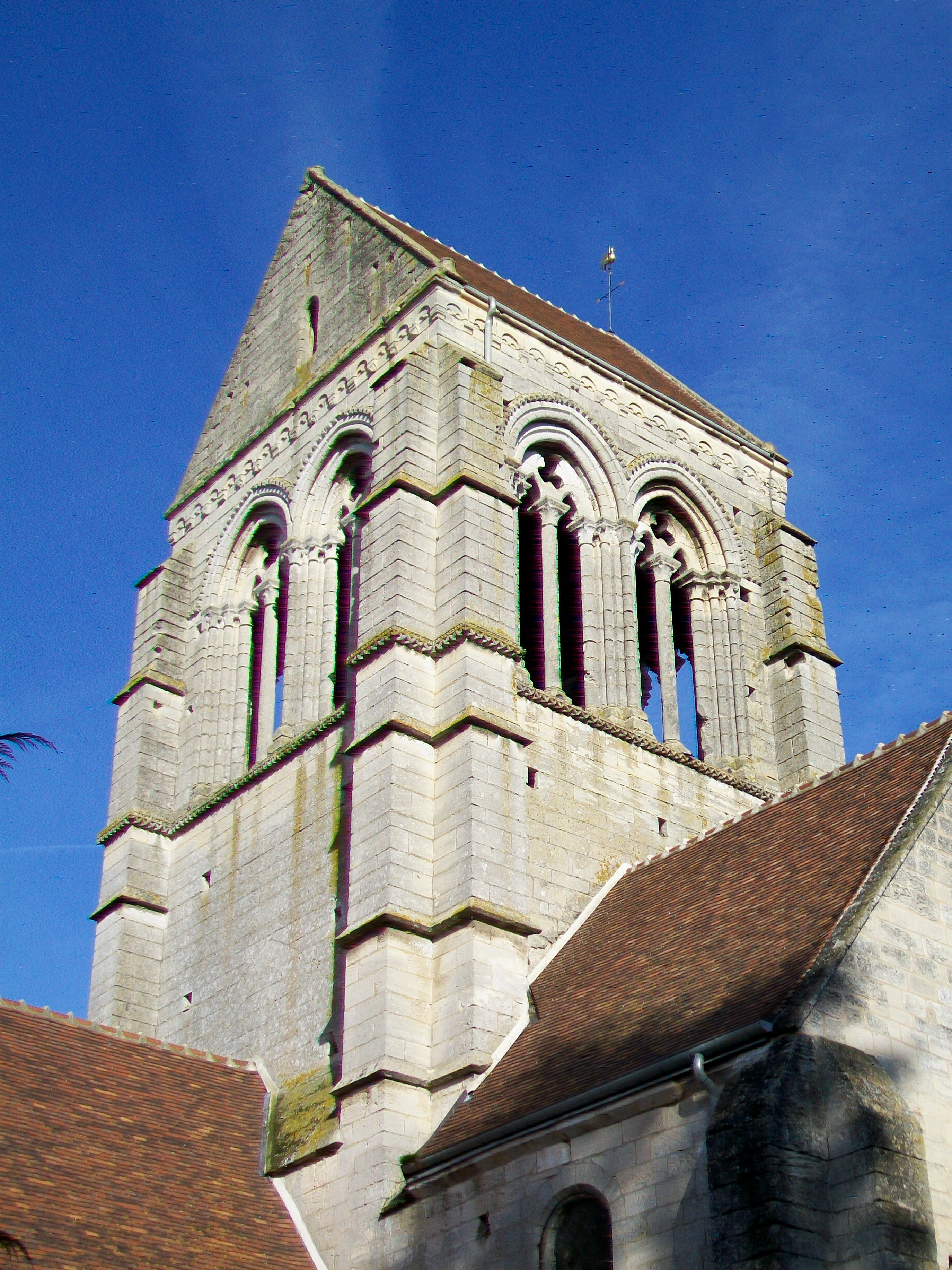 Les faces sud et ouest du clocher.